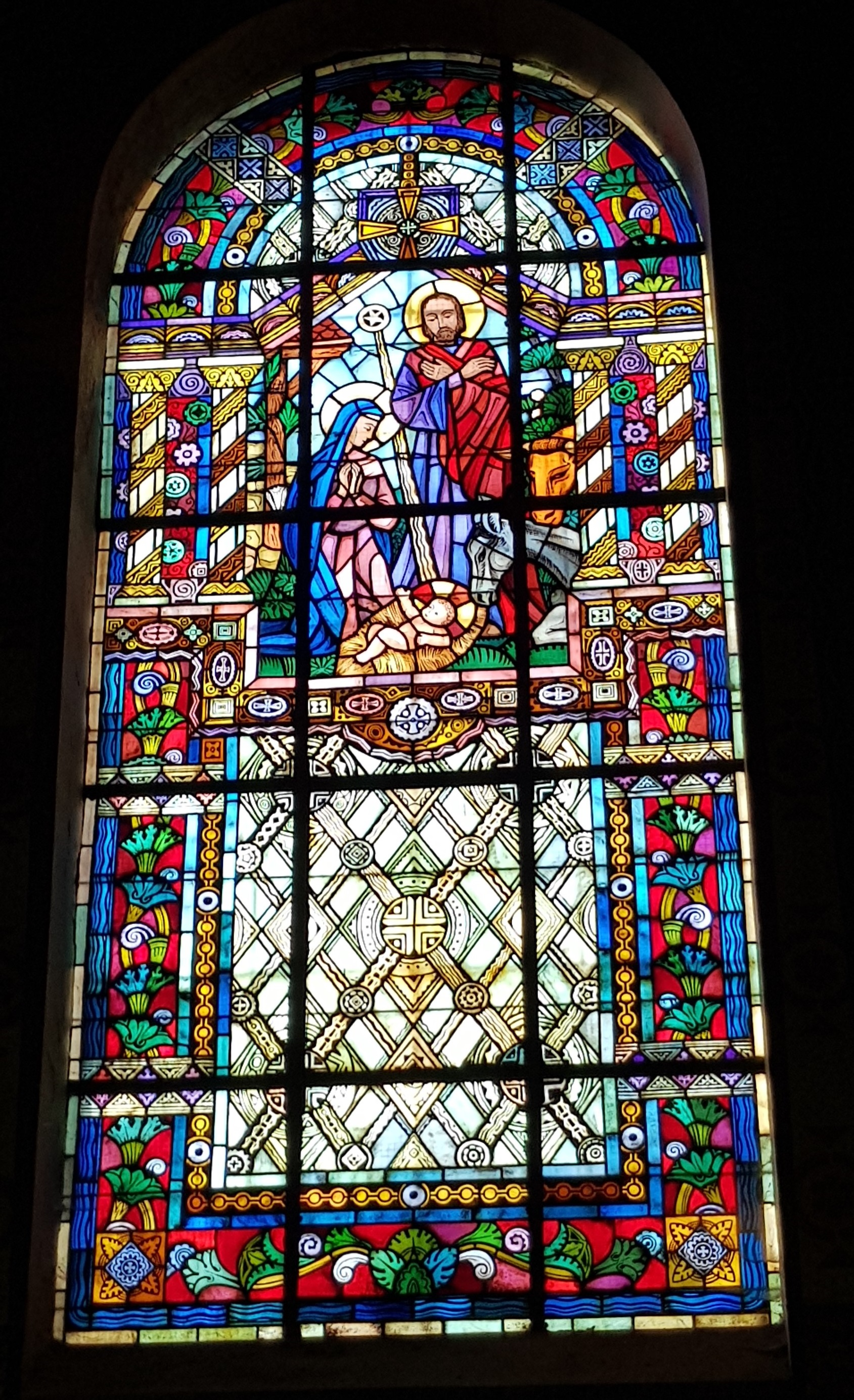 Vitrail dans la basilique Notre-Dame de Brebières à Albert (Somme - France)